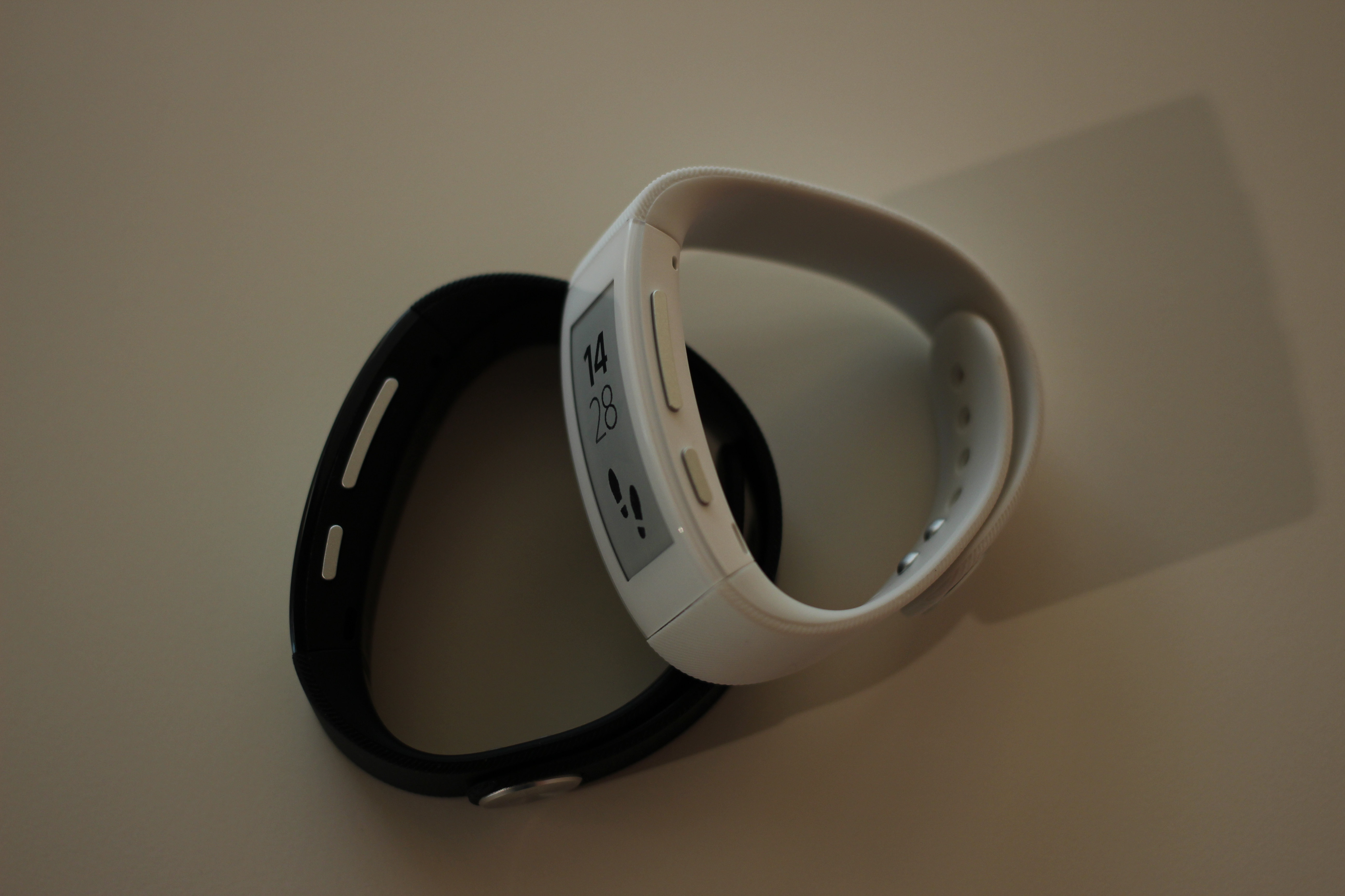 Sony SmartBand Talk